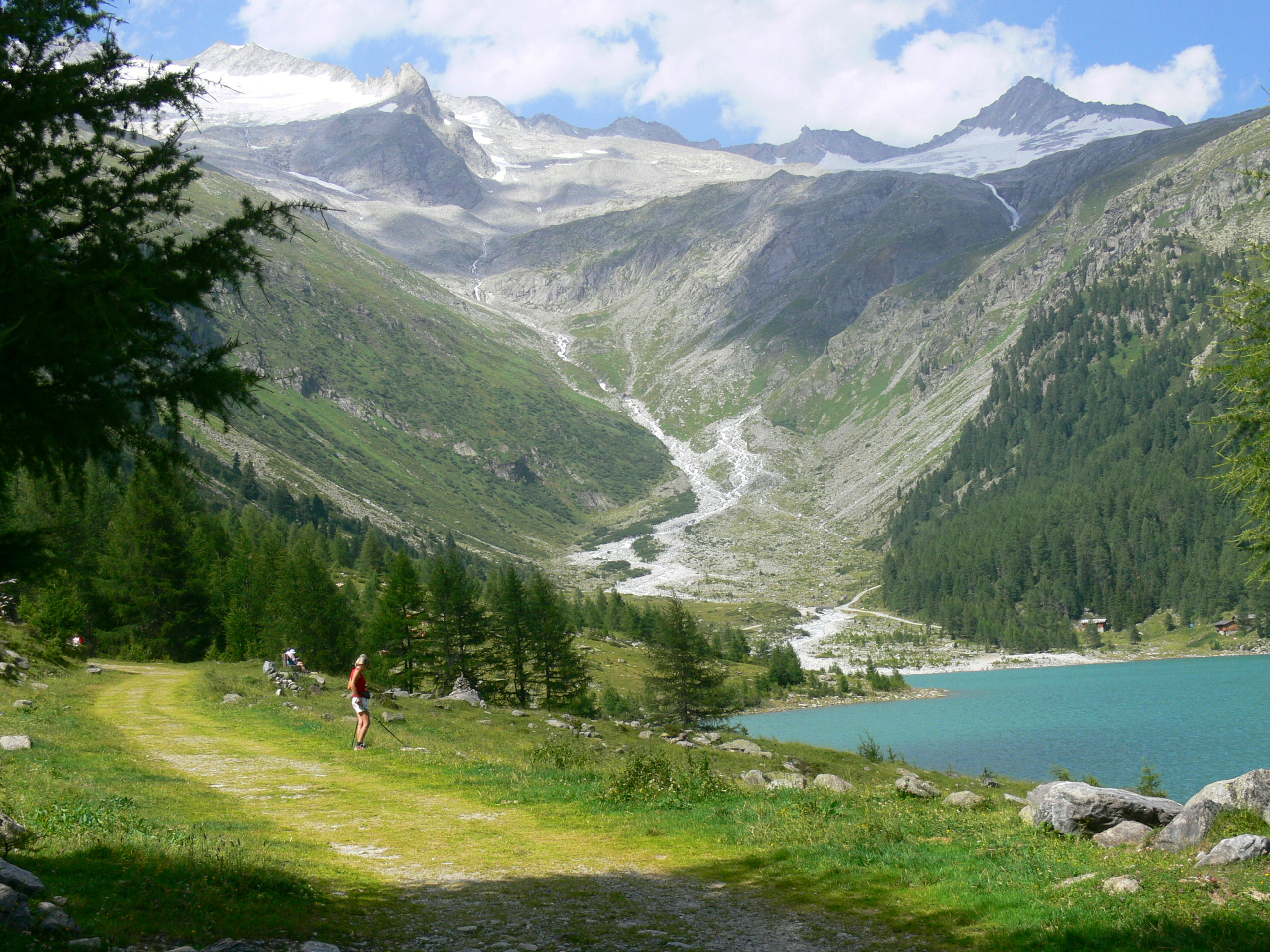 Mühlwalder Tal. Am Rundweg um den Nevesstausee.